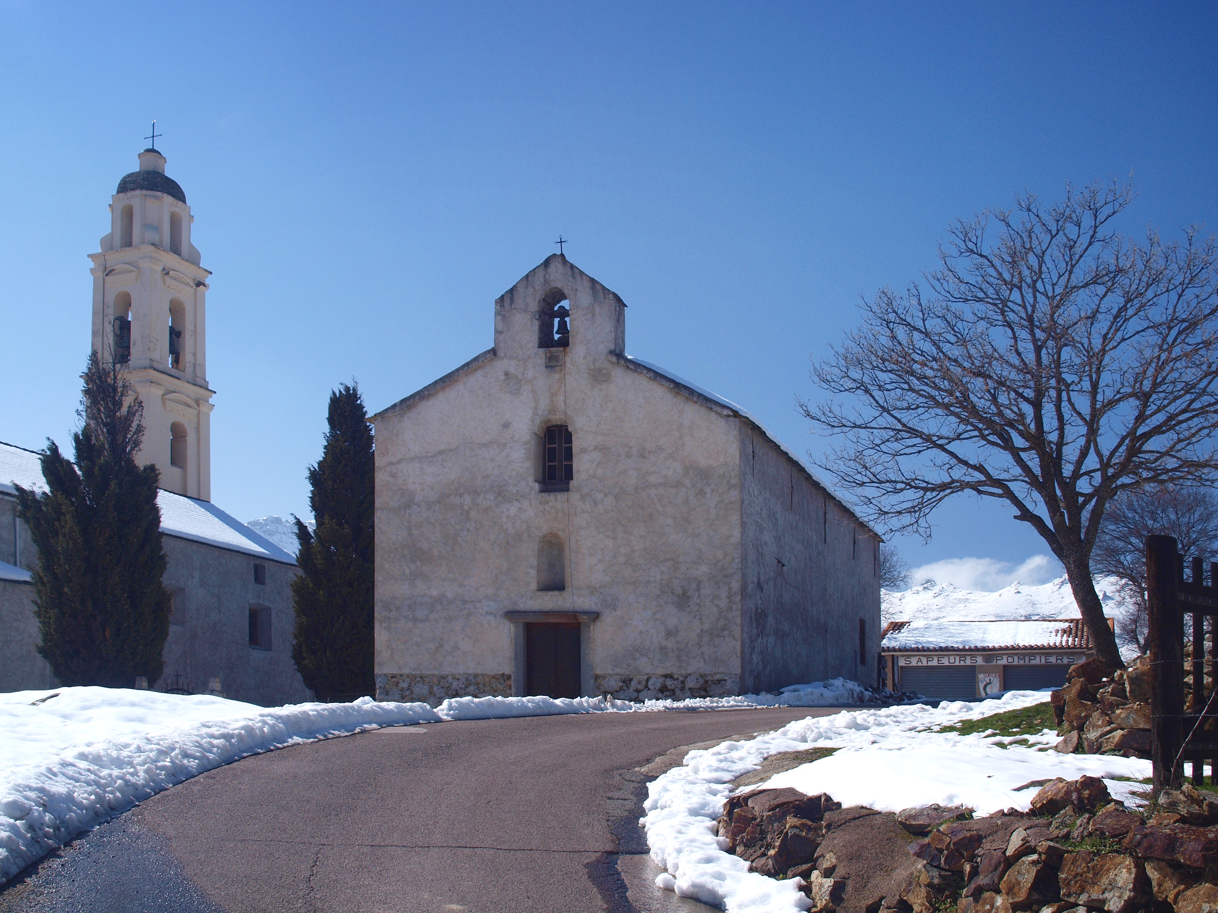 Olmi-Cappella (Corsica) - Confrérie Saint-Antoine avec l'église Saint-Nicolas à gauche et la caserne des pompiers à droite.